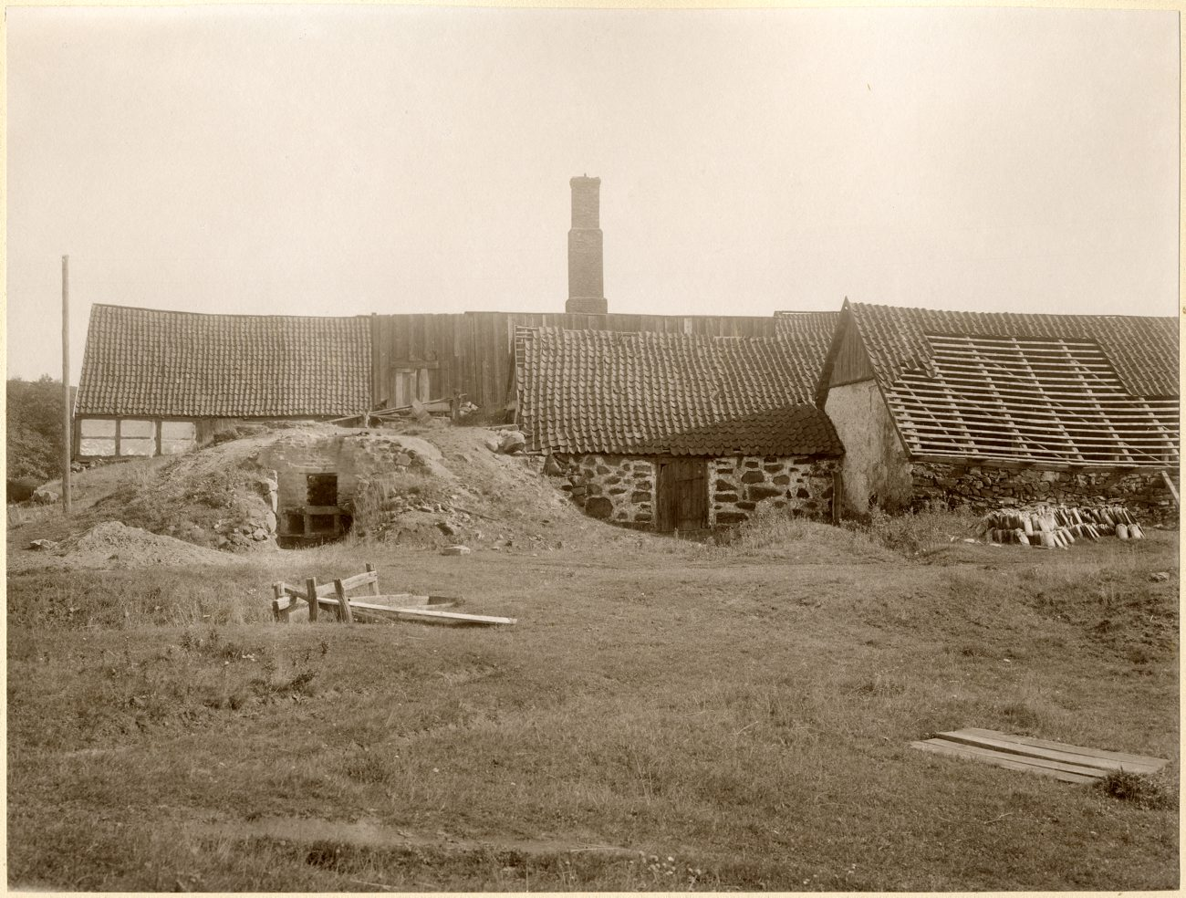 DIG17399. Parti af pannehuset Andrarums alunbruk. Fotografiet är skänkt till Tekniska museet från Svenska Turistföreningen.